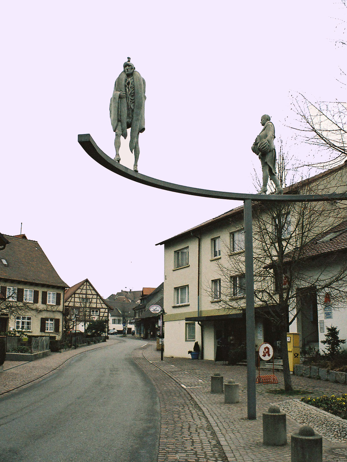 Peter Lenk, Dix-Kurve, 1997, - Deutschland, Baden-Württemberg, Landkreis Konstanz, Gaienhofen, Schlossstraße